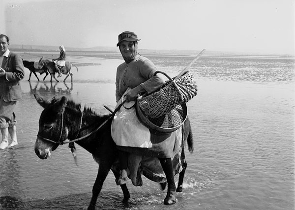 Teitl Cymraeg/Welsh title: Merched yn casglu cocos ym Mhen-clawdd, Morgannwg Cyfrwng/Medium: Negydd ffilm / Film negative Cyfeiriad/Reference: (gch12120) Rhif cofnod / Record no.: 3369677 Rhagor o wybodaeth am gasgliad Geoff Charles yn Llyfrgell Genedlaethol Cymru More information about the Geoff Charles Collection at the National Library of Wales Mae ffotograffau Geoff Charles hefyd yn rhan o Broject Europeana Libraries Geoff Charles' photographs also form part of the Europeana Libraries Project